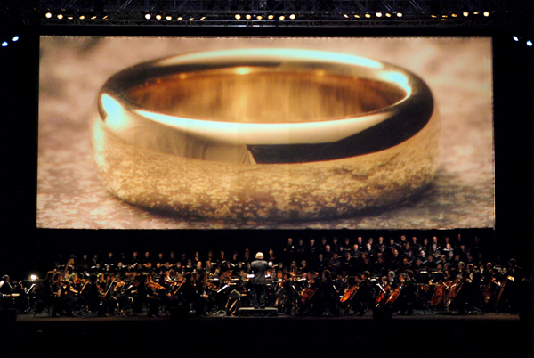 1. Festiwal Muzyki Filmowej w Krakowie, pokaz finałowy